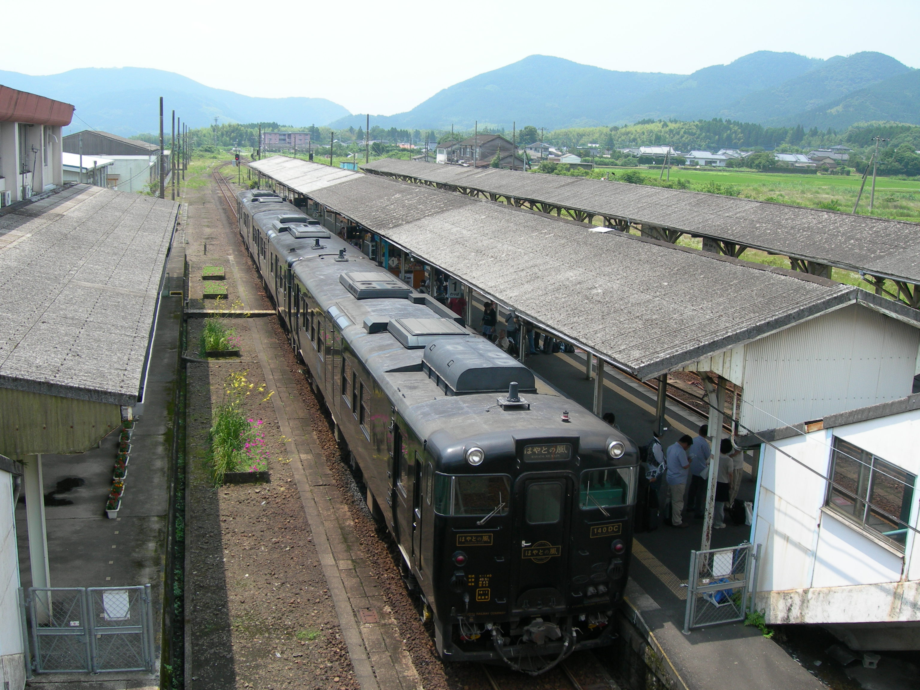 吉松駅ホーム